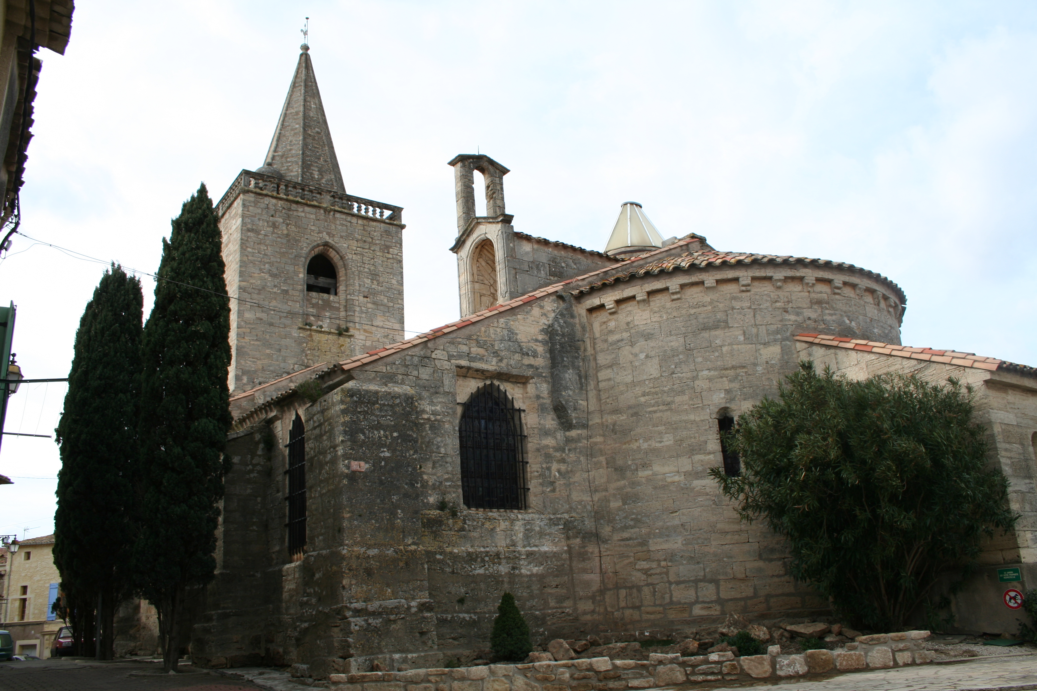 Nézignan-l'Évêque (Hérault) - Église Sainte-Marie-Magdeleine.